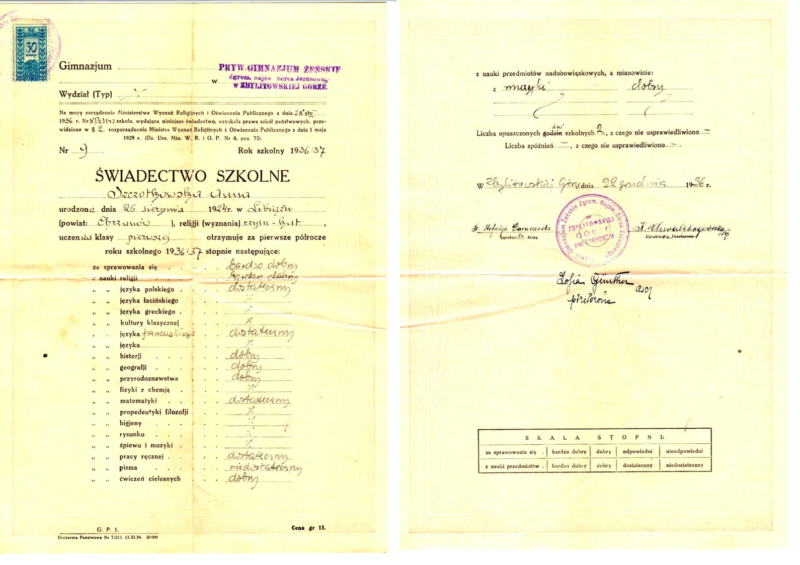 świadectwo szkolne Anny Szczotkowskiej (1924-2024) za pierwsze półrocze roku szkolnego 1936/37 wydane przez Prywatne Gimnazjum Żeńskie Zgromadzenia Sióstr Najświętszego Serca Jezusowego (Sacré-Cœur) w Zbylitowskiej Górze